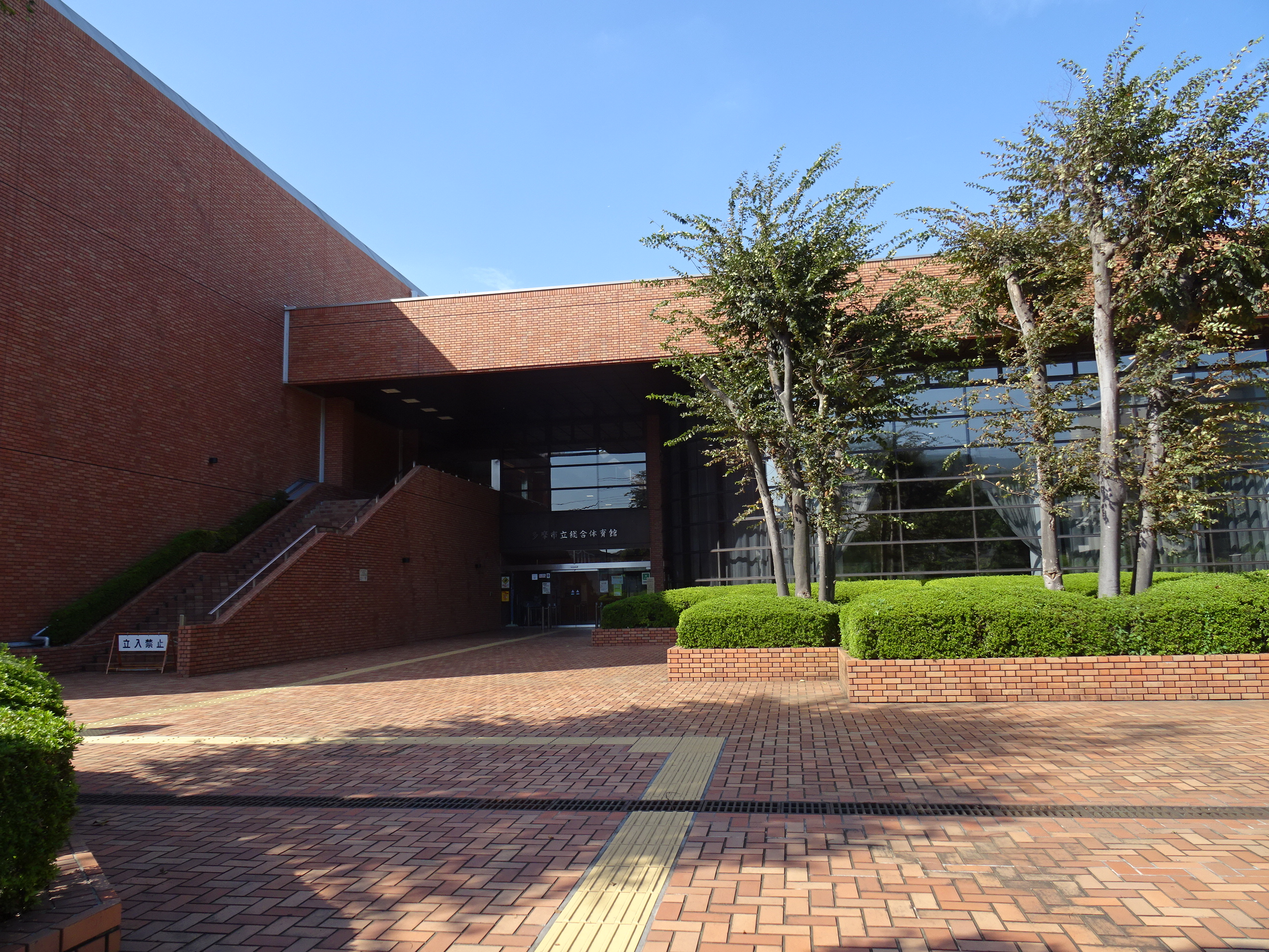 多摩市立総合体育館（2015/10/03撮影）